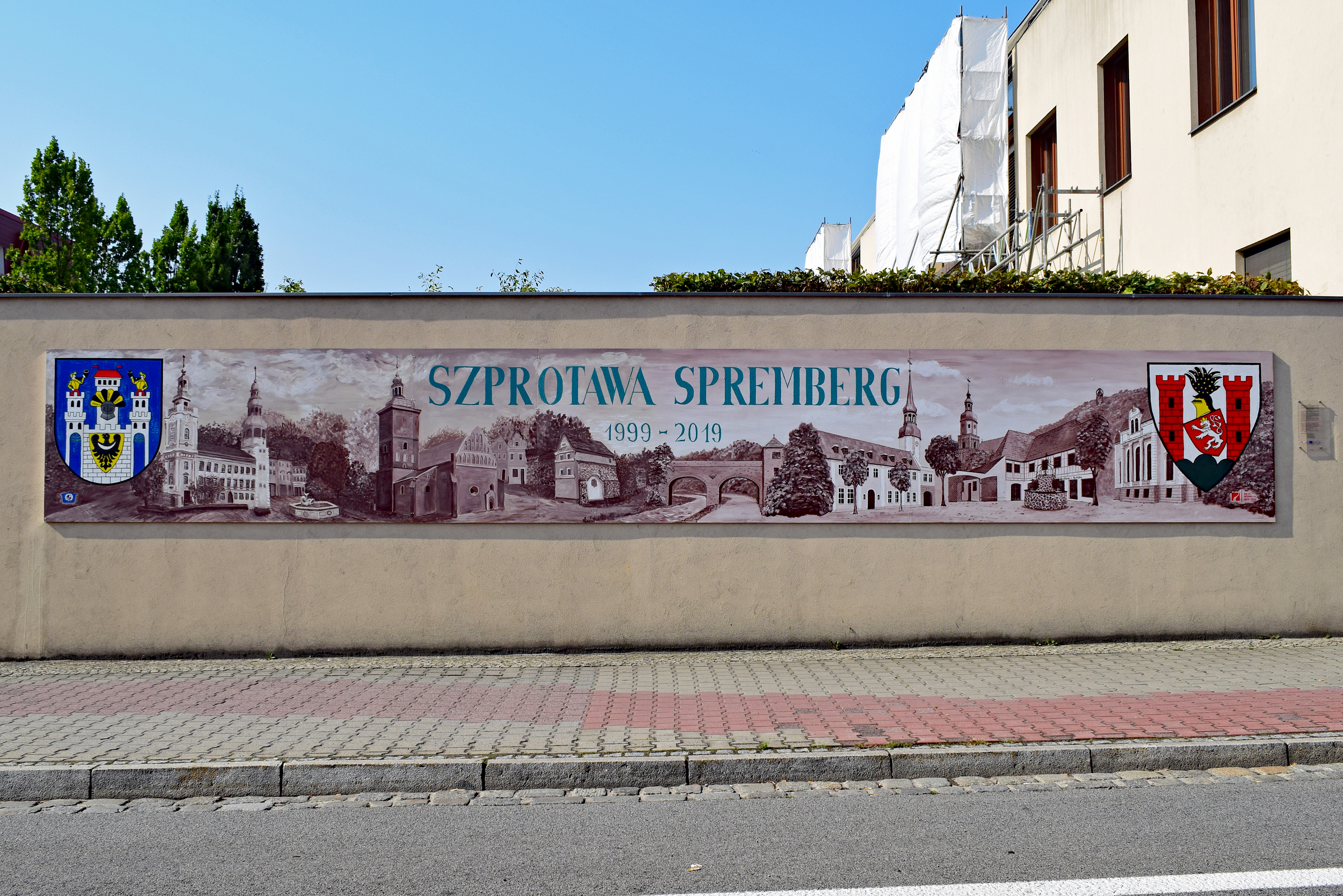 Wandbild zum 20 Jubiläum der Städtepartnerschaft zwischen Szprotawa (Polen) und Spremberg (Deutschland) an der Mauer des Bürgergartens in der Schlossstraße in Spremberg. Das Wandbild wurde am 10. August 2019 im Zuge des Heimatfestes in Spremberg enthüllt.